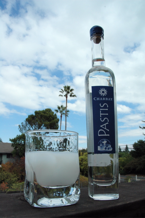 La distillerie californienne Charbay commercialise un pastis sans colorant titré à 45°.